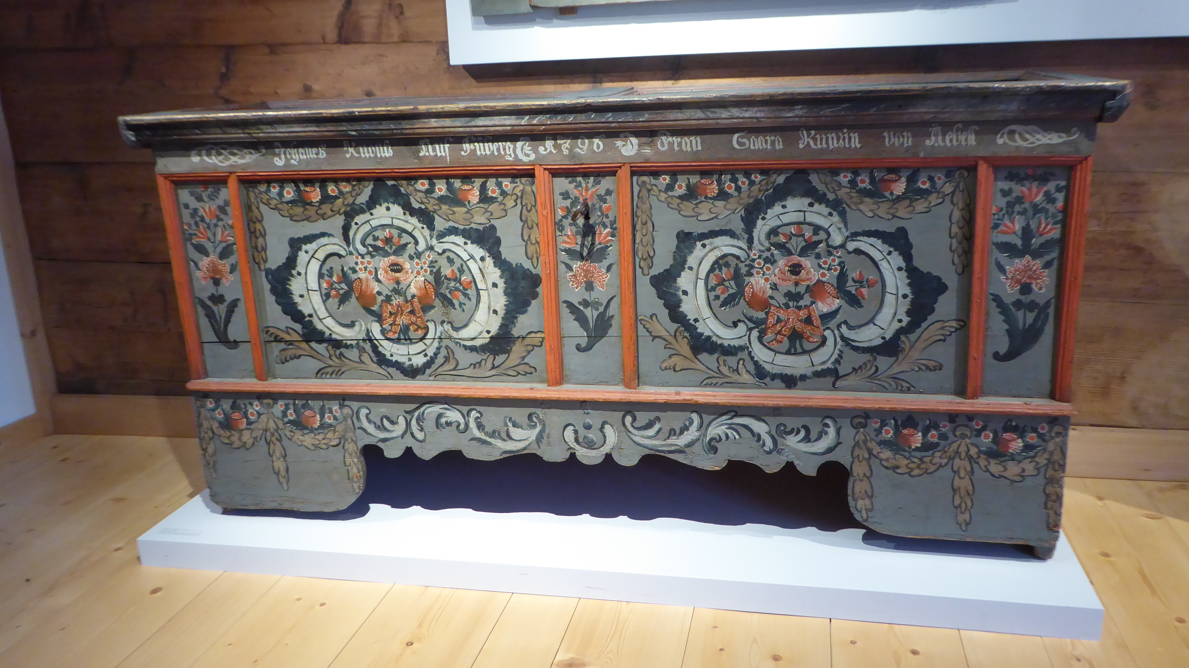 Truhe mit der Aufschrift «Johannes Kuontz Auf Füberg 1796 Frau Saara Kunzin von Äbell»